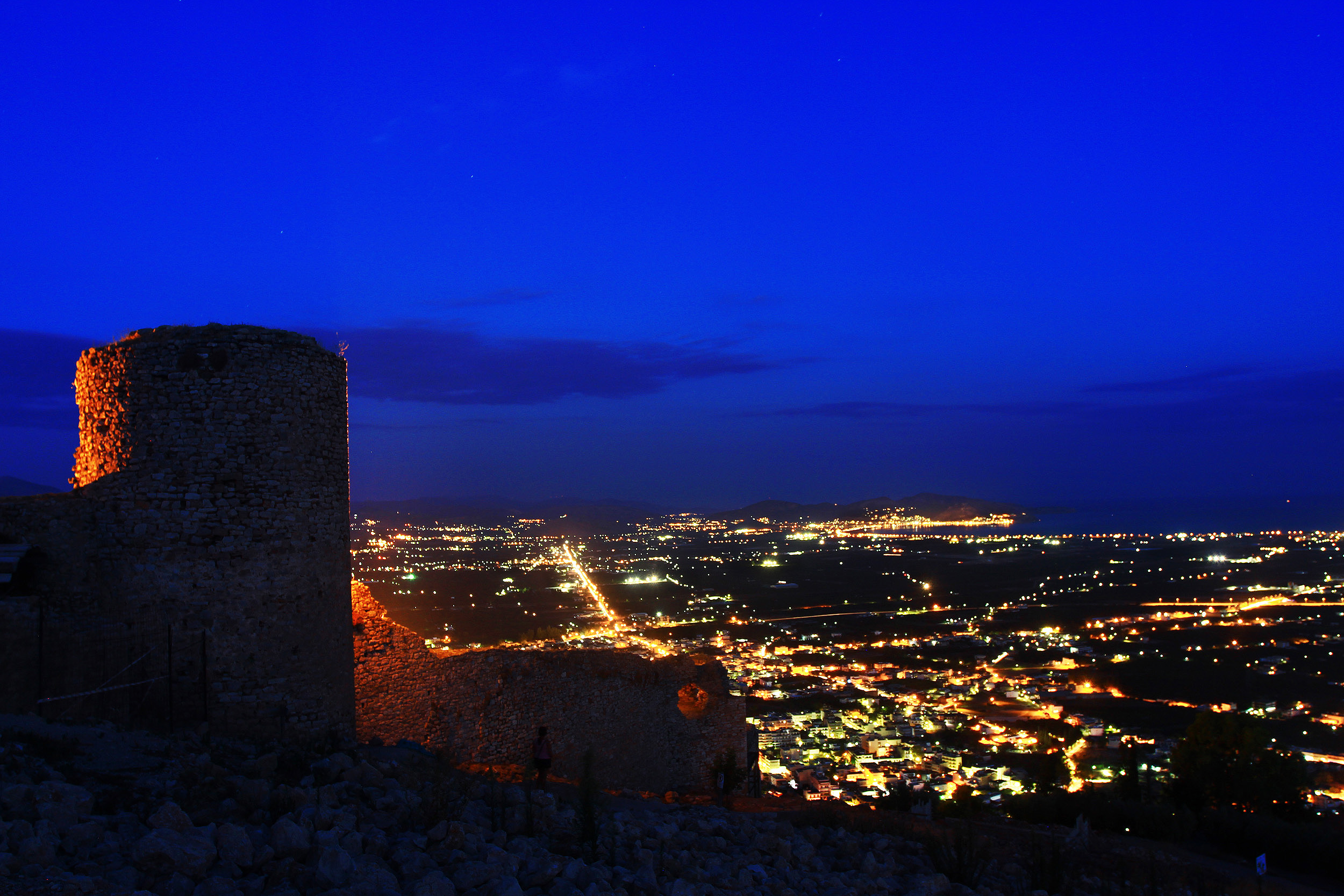 Κάστρο Άργους«Κάστρο Άργους»